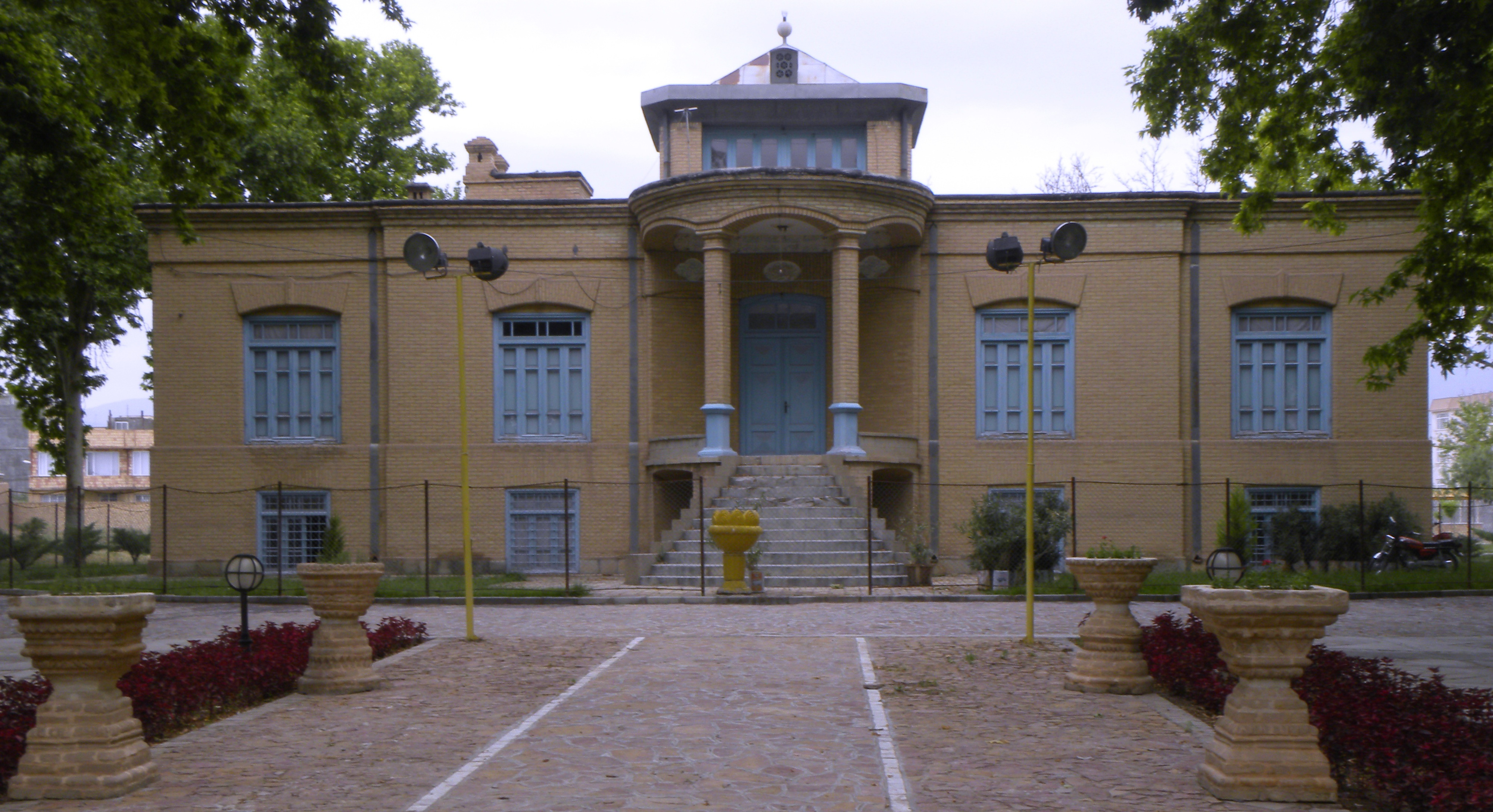 Amin Al-Islami Mansion